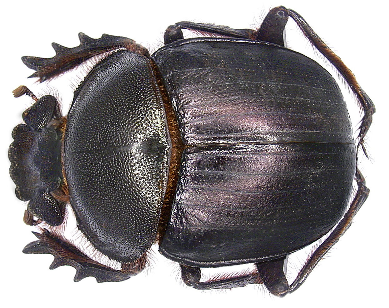 Familie: Scarabaeidae Grösse: 22-38 mm Fundort: Namibia, Omaruru leg. det. U.Schmidt, 1994 Foto: U.Schmidt, 2006